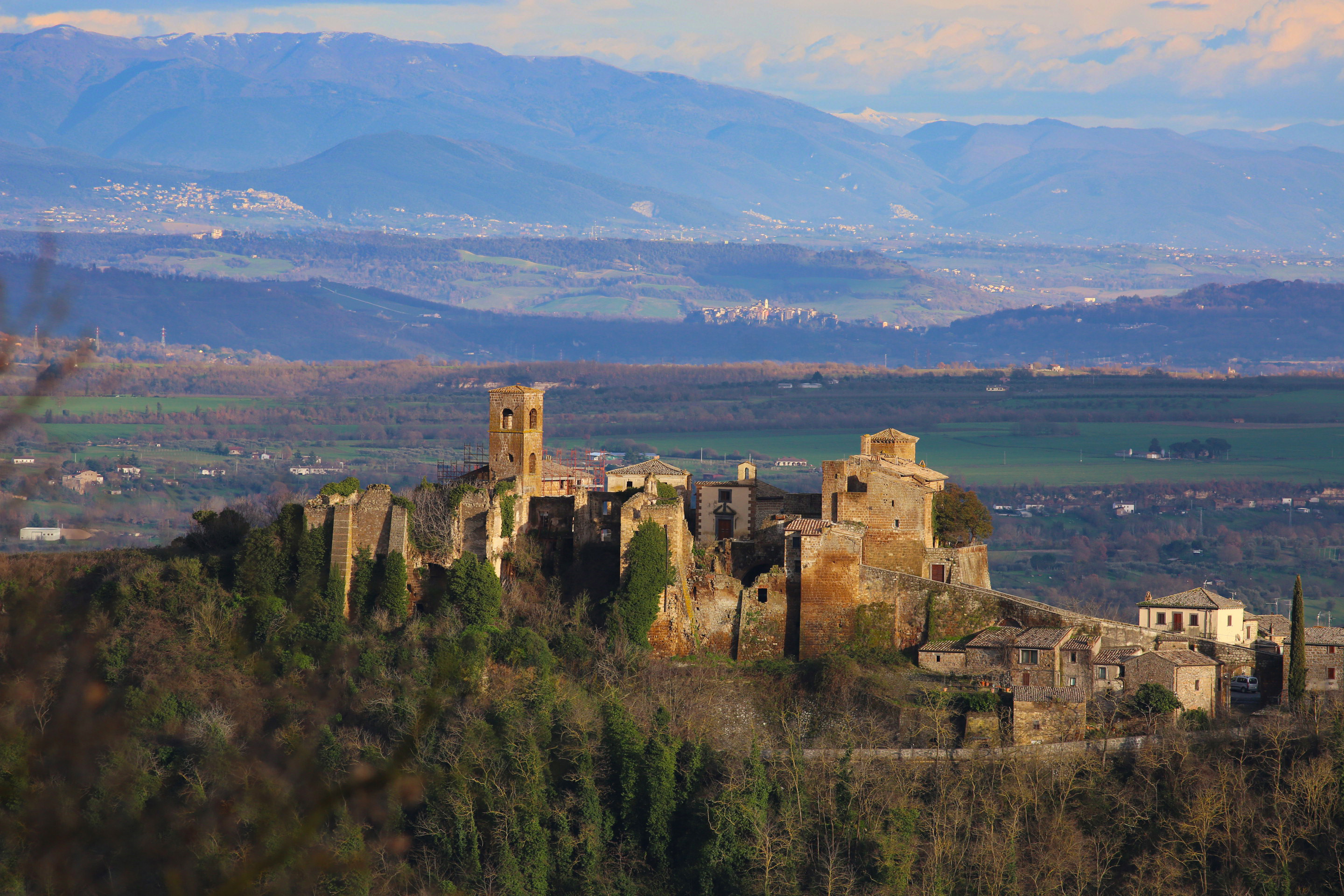 Vista di Celleno, Orte, Calvi, Roccantica e Casperia.